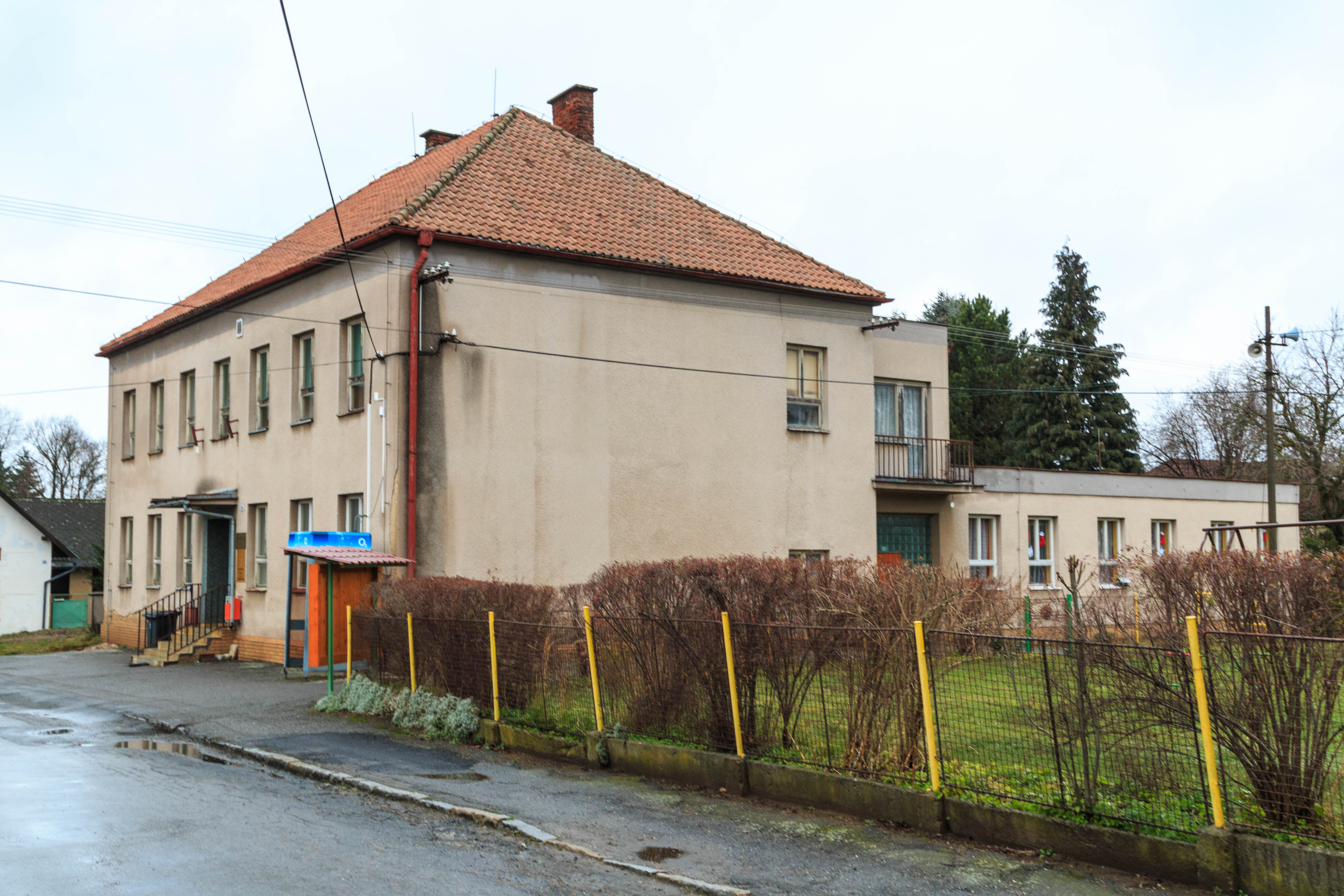 Malčín obecní úřad